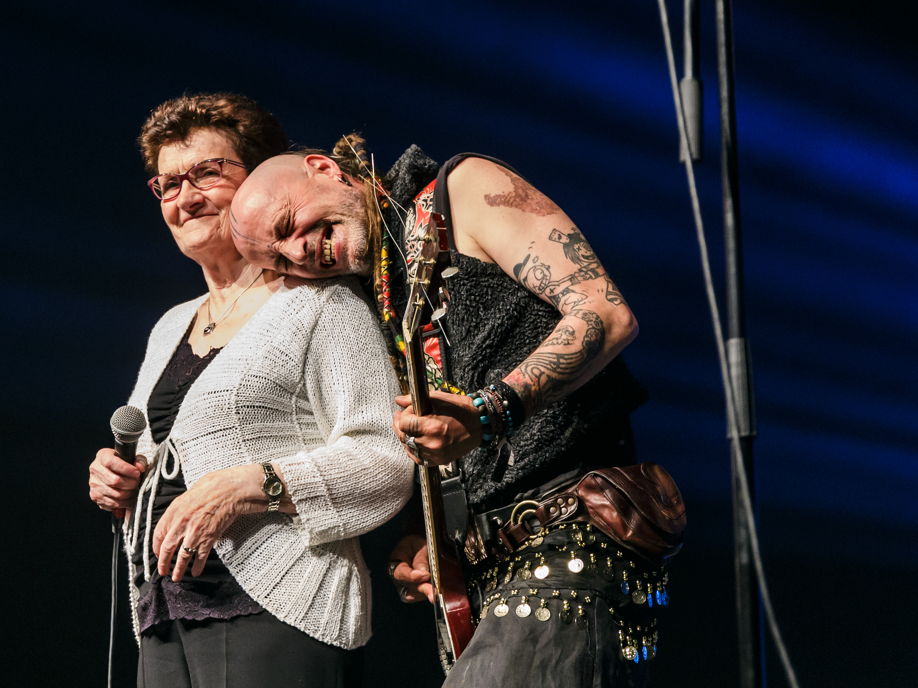 Les Ramoneurs de menhirs et la chanteuse Louise Ebrel en fest-noz au parc des expos de Penvillers à Quimper à l'occasion des 50 ans de la confédération des cercles War'l Leur le 29 avril 2017.